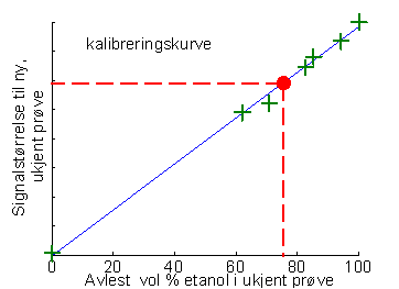 betemmelse av etanolinnhold i ukjent prøve